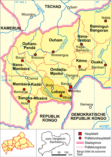 politische Karte der Zentralafrikanischen Republik (Präfektur Lobaye hervorgehoben)